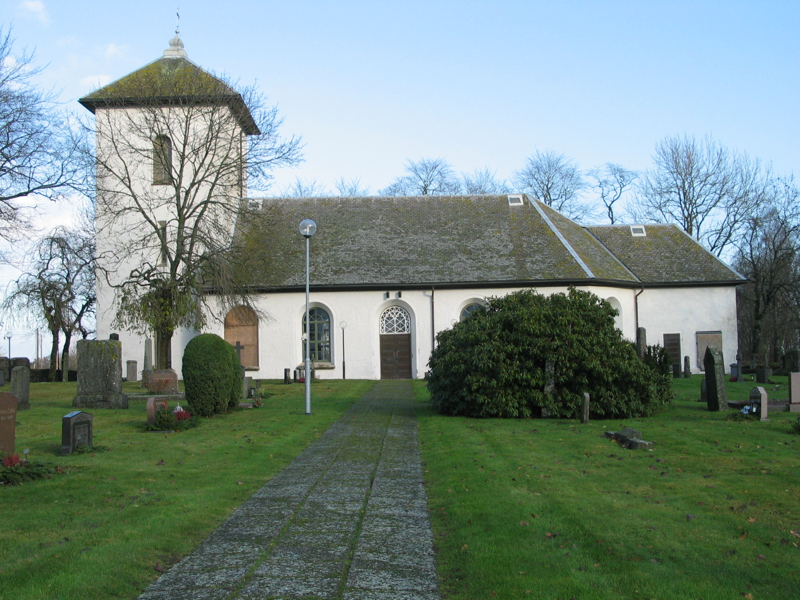 Gestad kyrka, Dalsland.